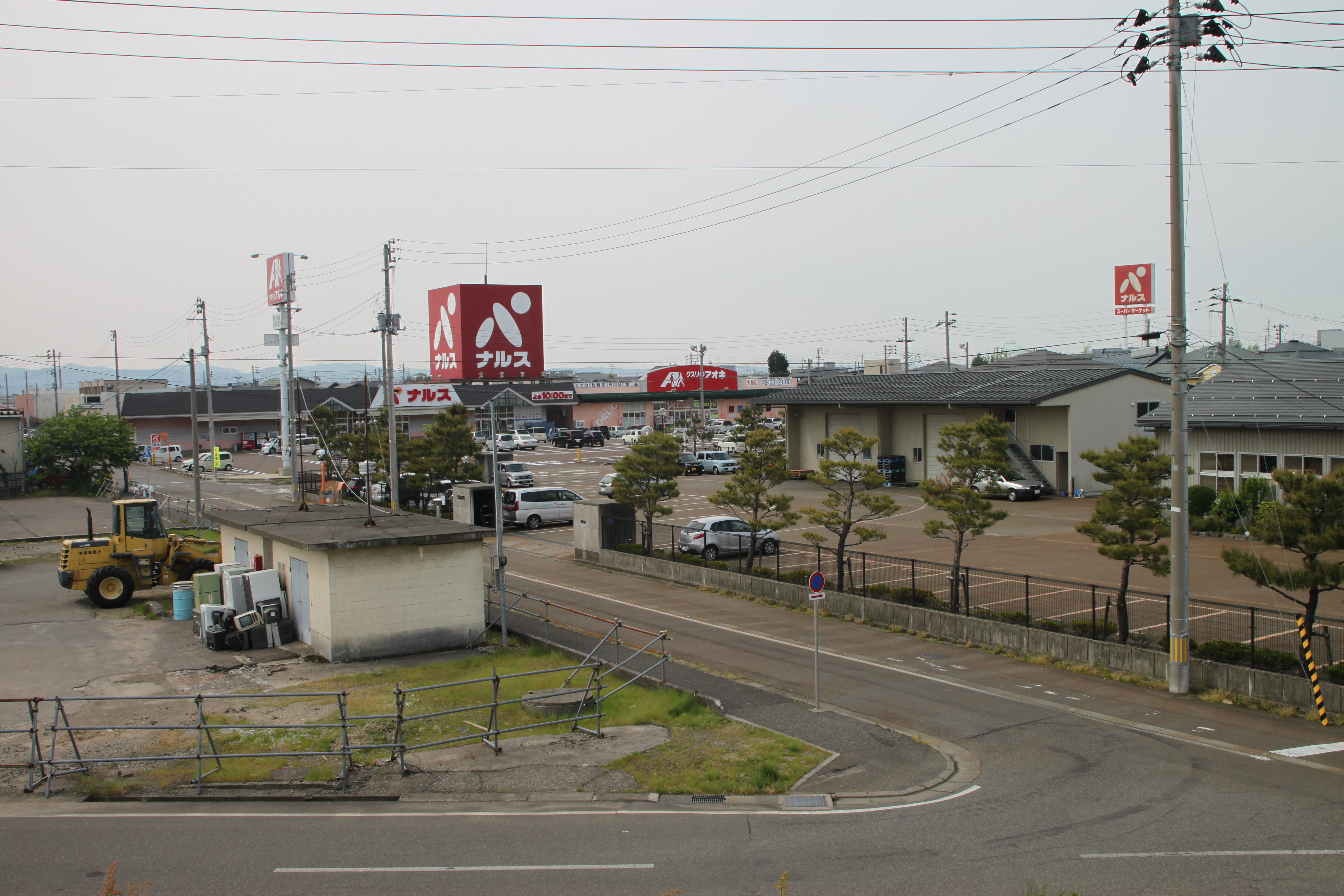 長岡鉄道西長岡駅跡。信濃川の堤防から見下ろす。スーパー（ナルス大島店）やその駐車場となっている敷地が旧構内。